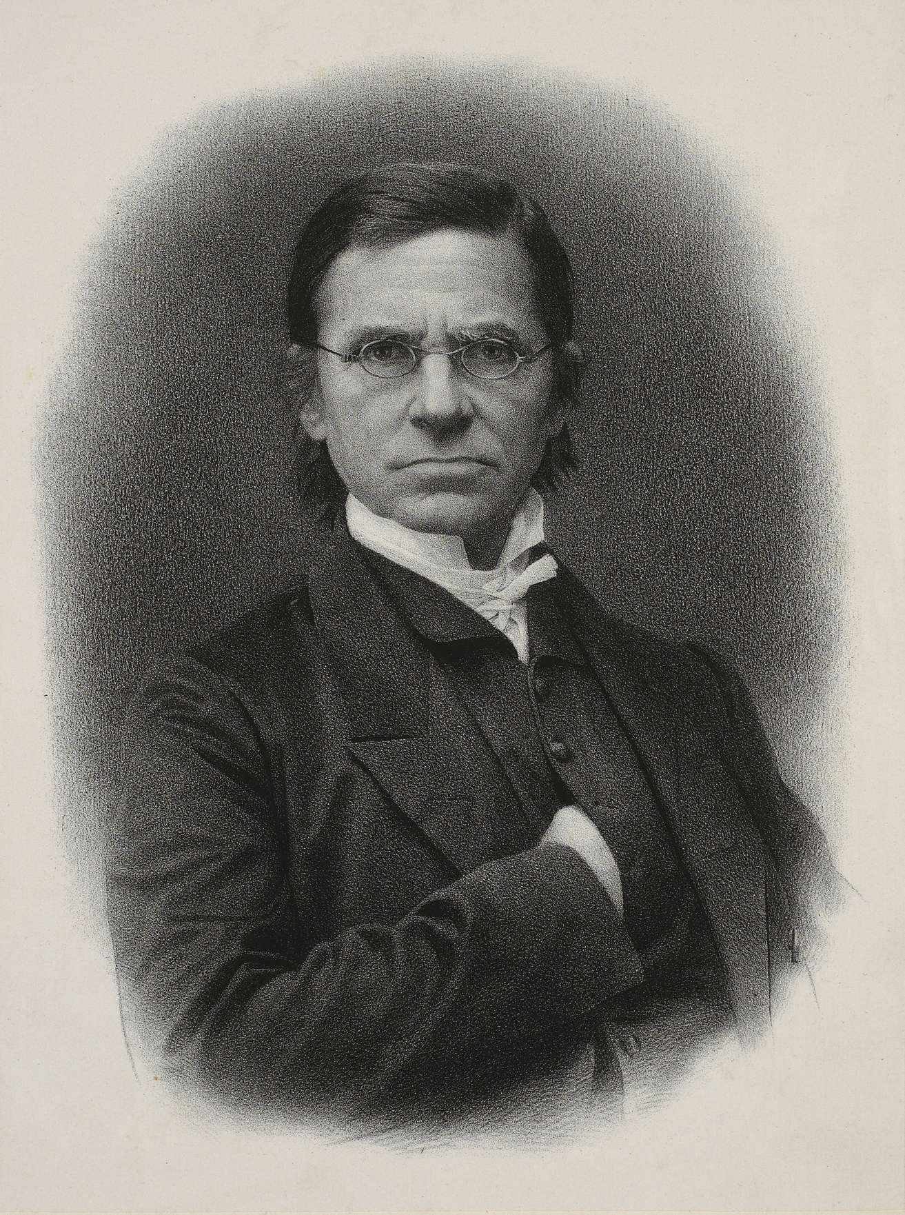 Émile Littré vers 1865